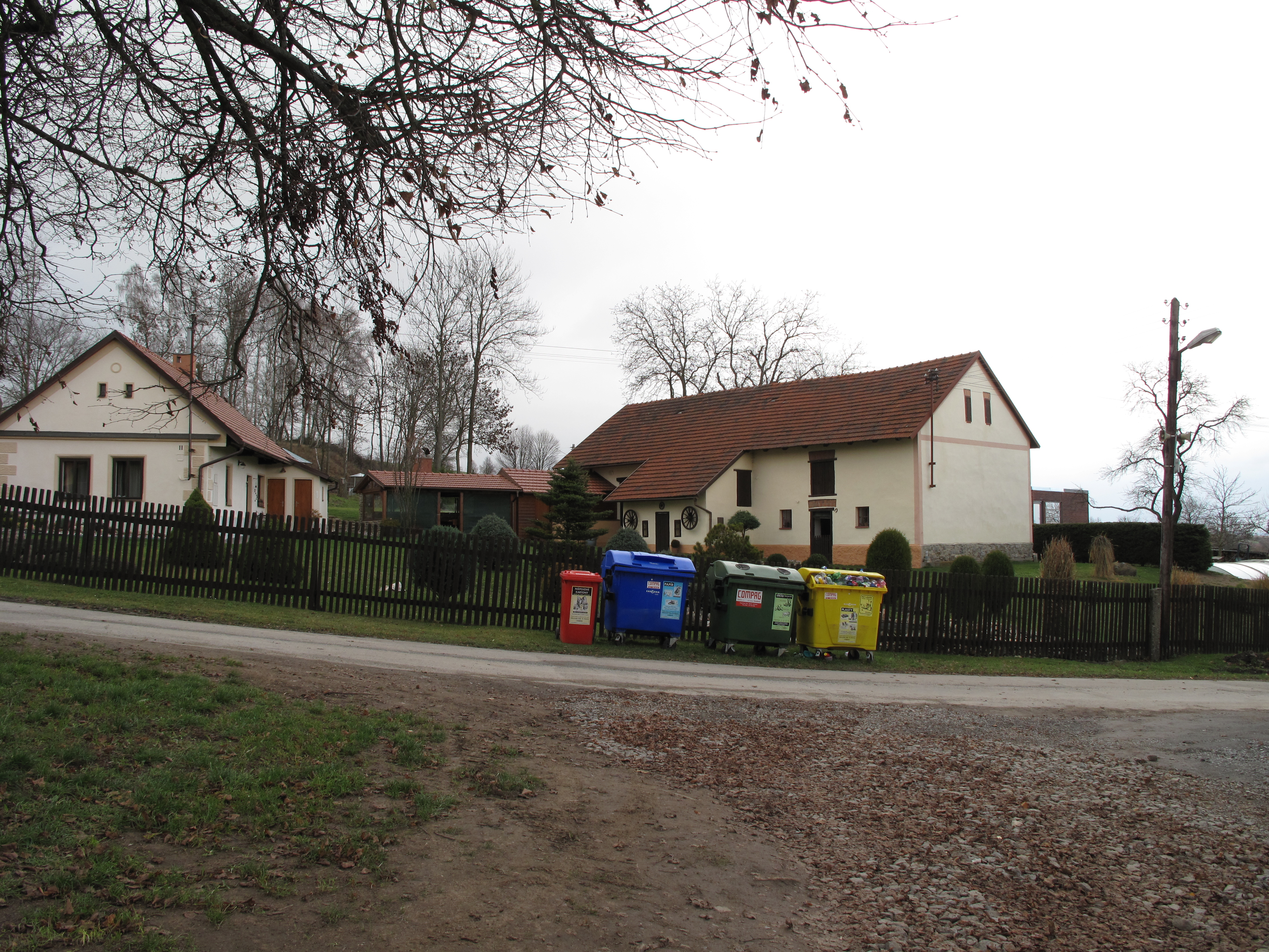 Kontajnery ve Stupčicích. Okres Benešov, Česká republika.